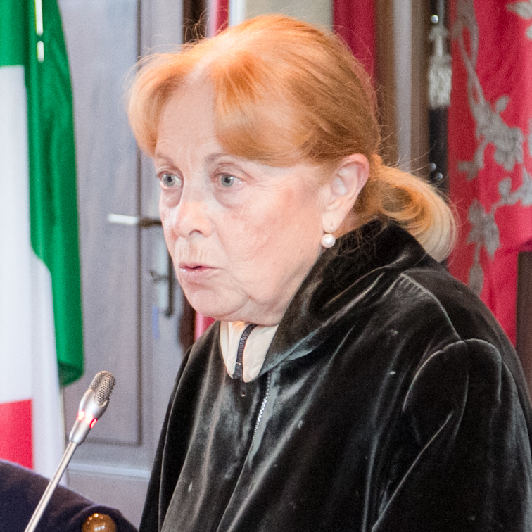 Andrea Chiodi e Silvia Vegetti Finzi